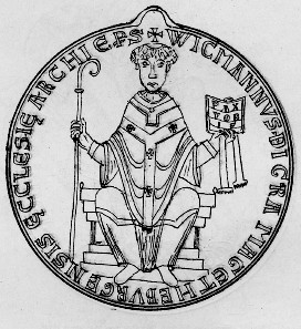 Wichmann von Seeburg